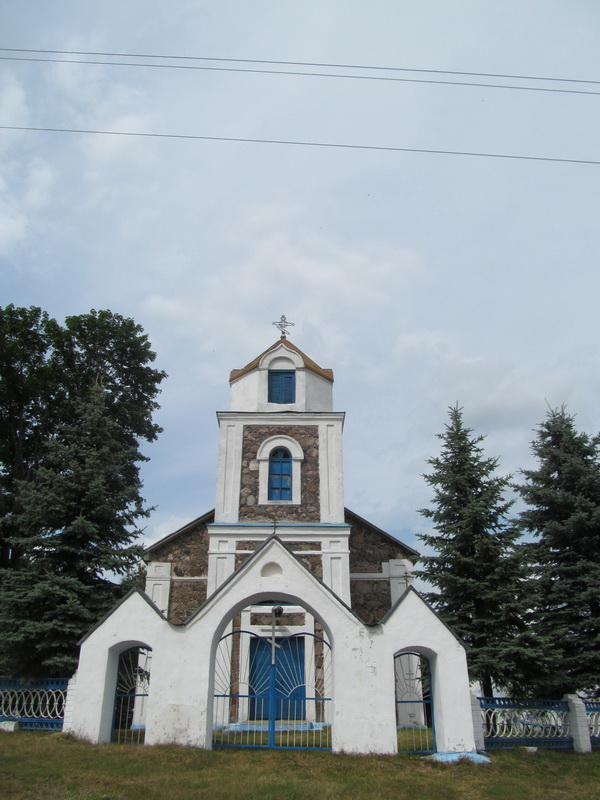 Груздава. Царква Яна Прадцечы